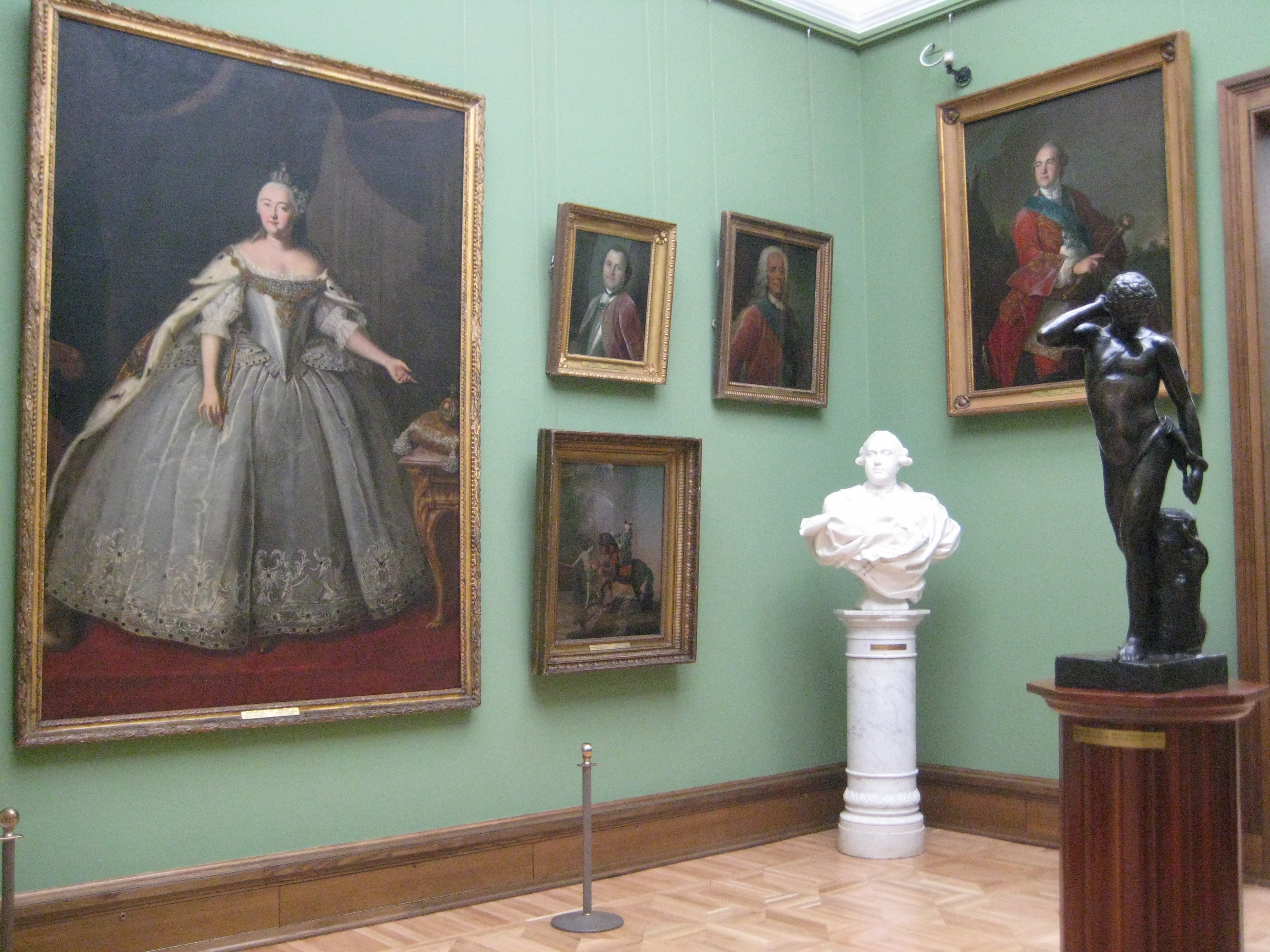 Третьяковская галерея. Зал искусства 18 века.